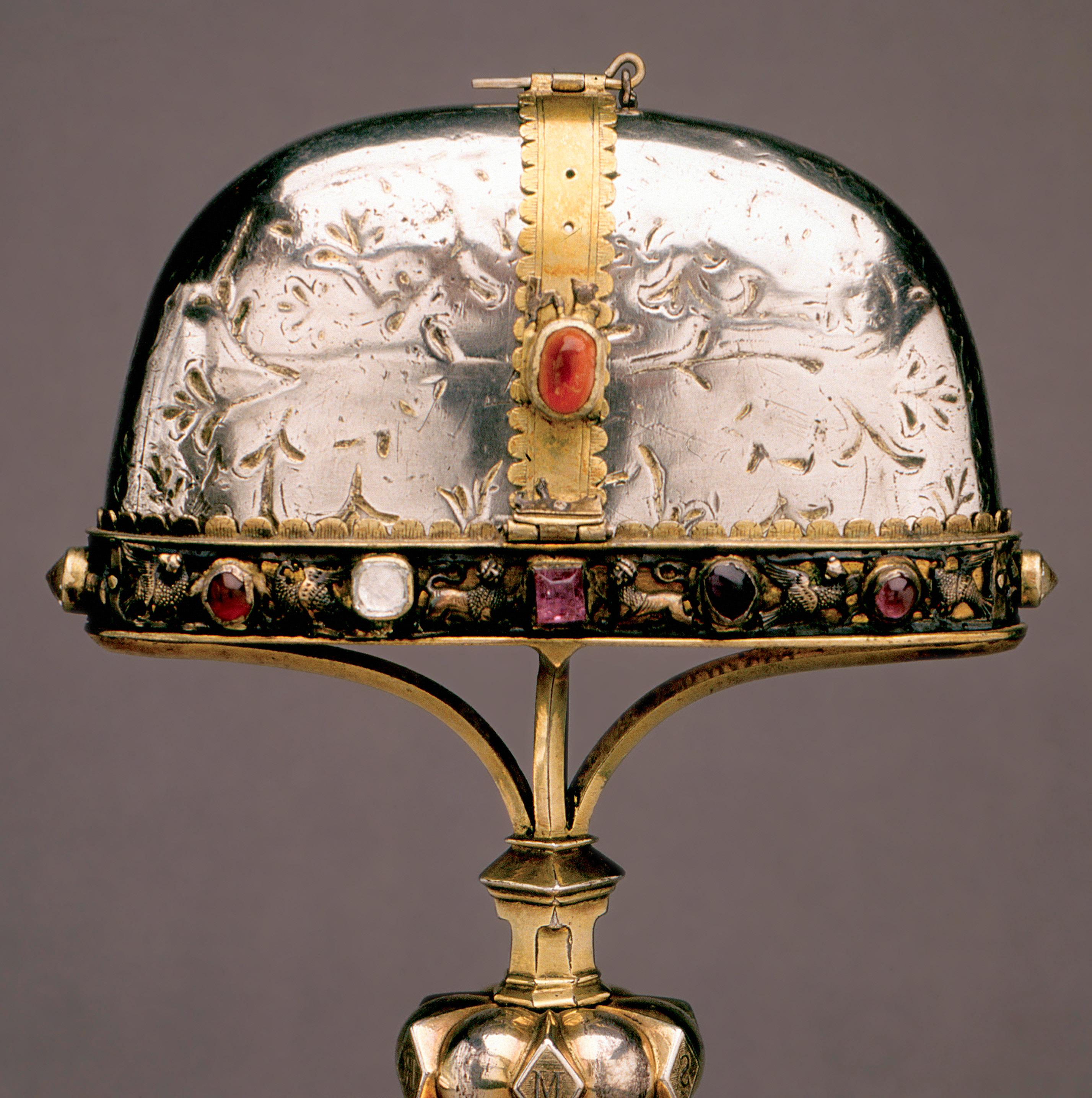 Das Hildesheimer Marienreliquiar, karolingisch, Gründungsreliquiar des Bistums Hildesheim